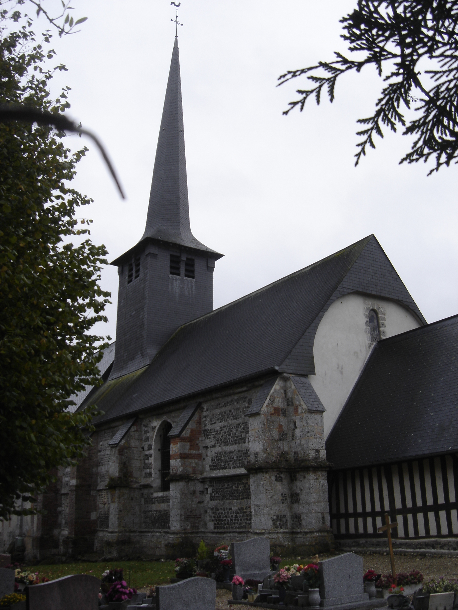 Eglise de Triqueville - Eure - France